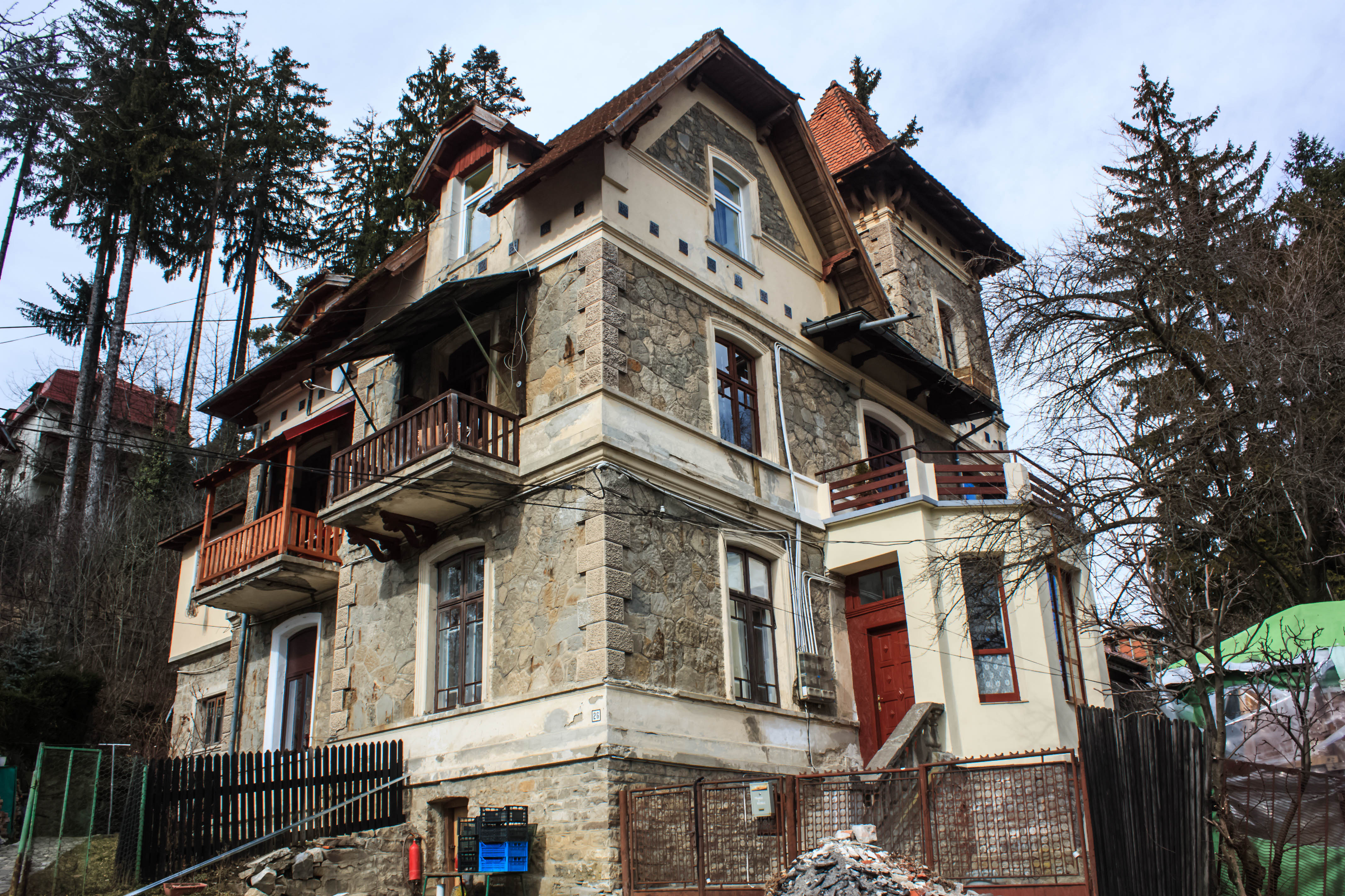 Casa Colete Zentilini